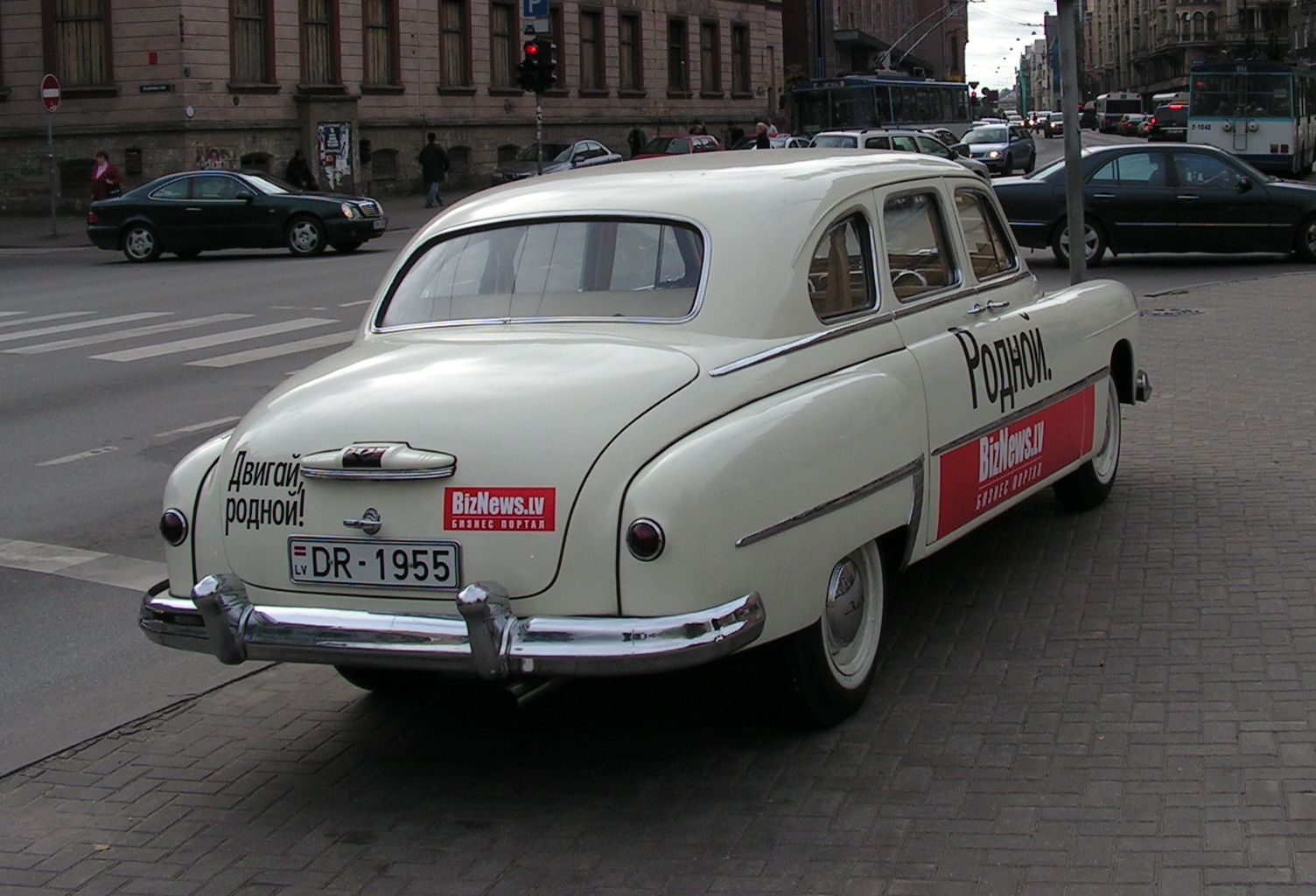 ZIM (ЗИМ) fotograferad i Riga, Lettland